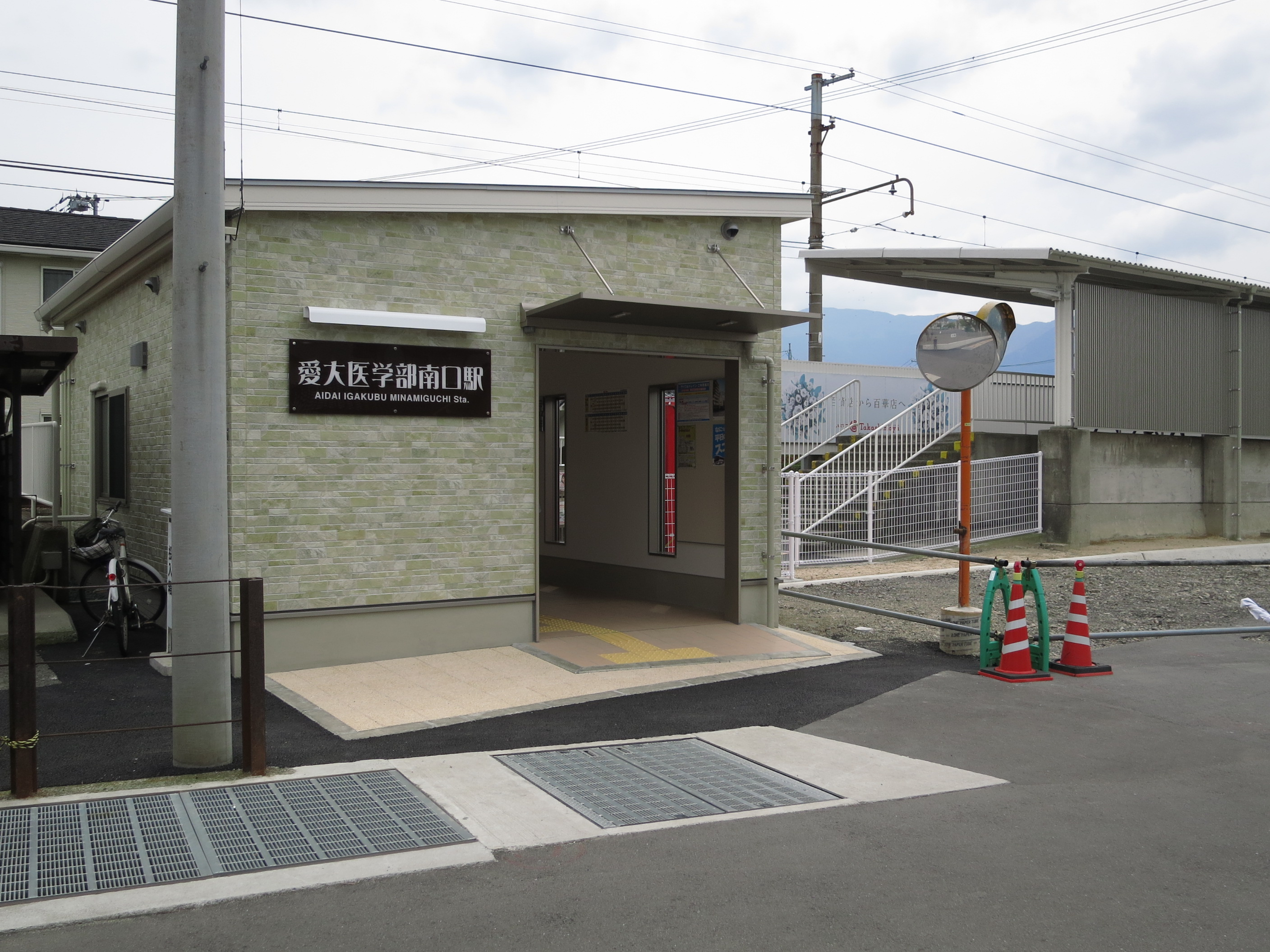 伊予鉄道横河原線・愛大医学部南口駅の2015年3月に新築された駅舎